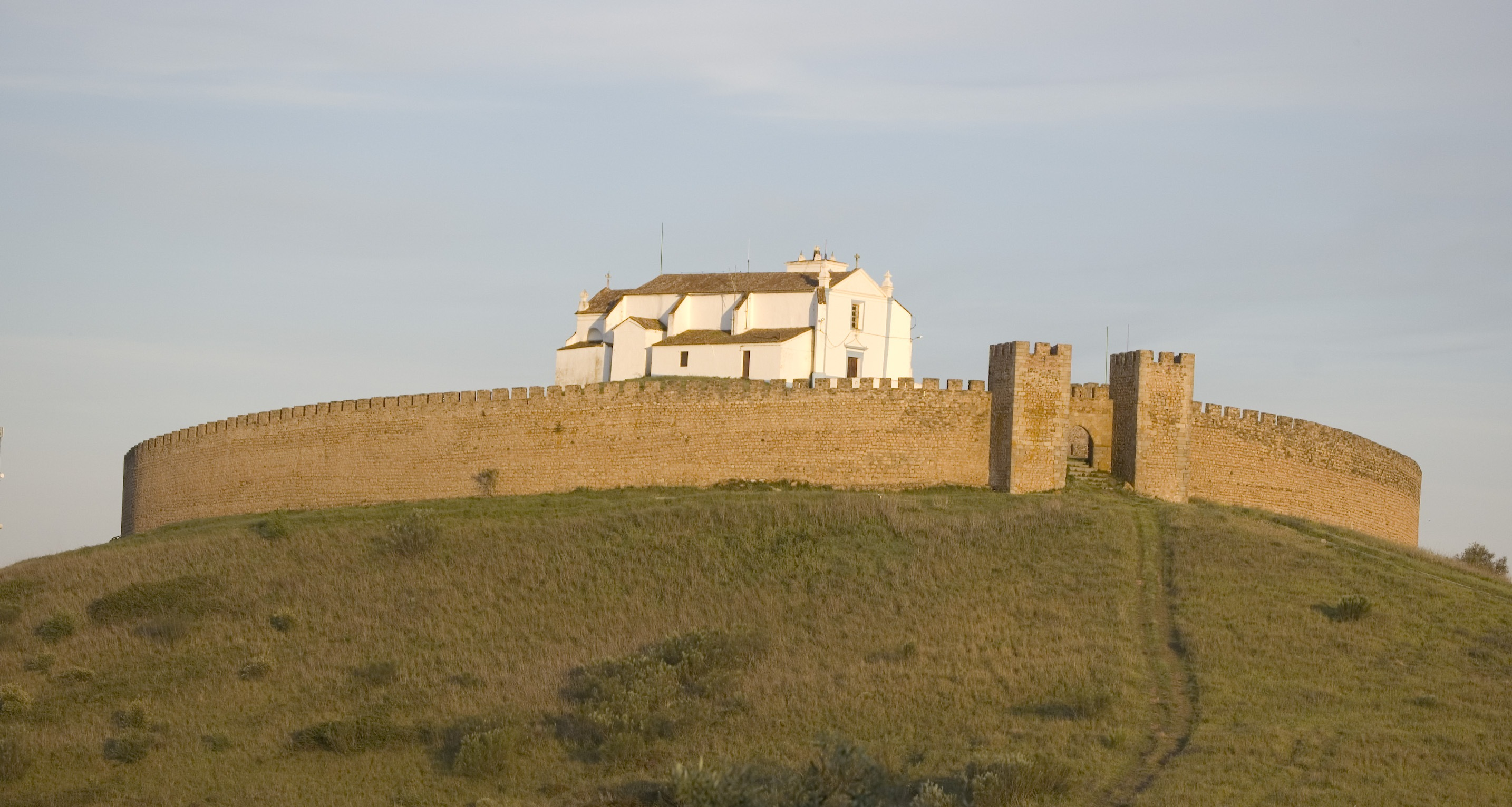 Arraiolos castle